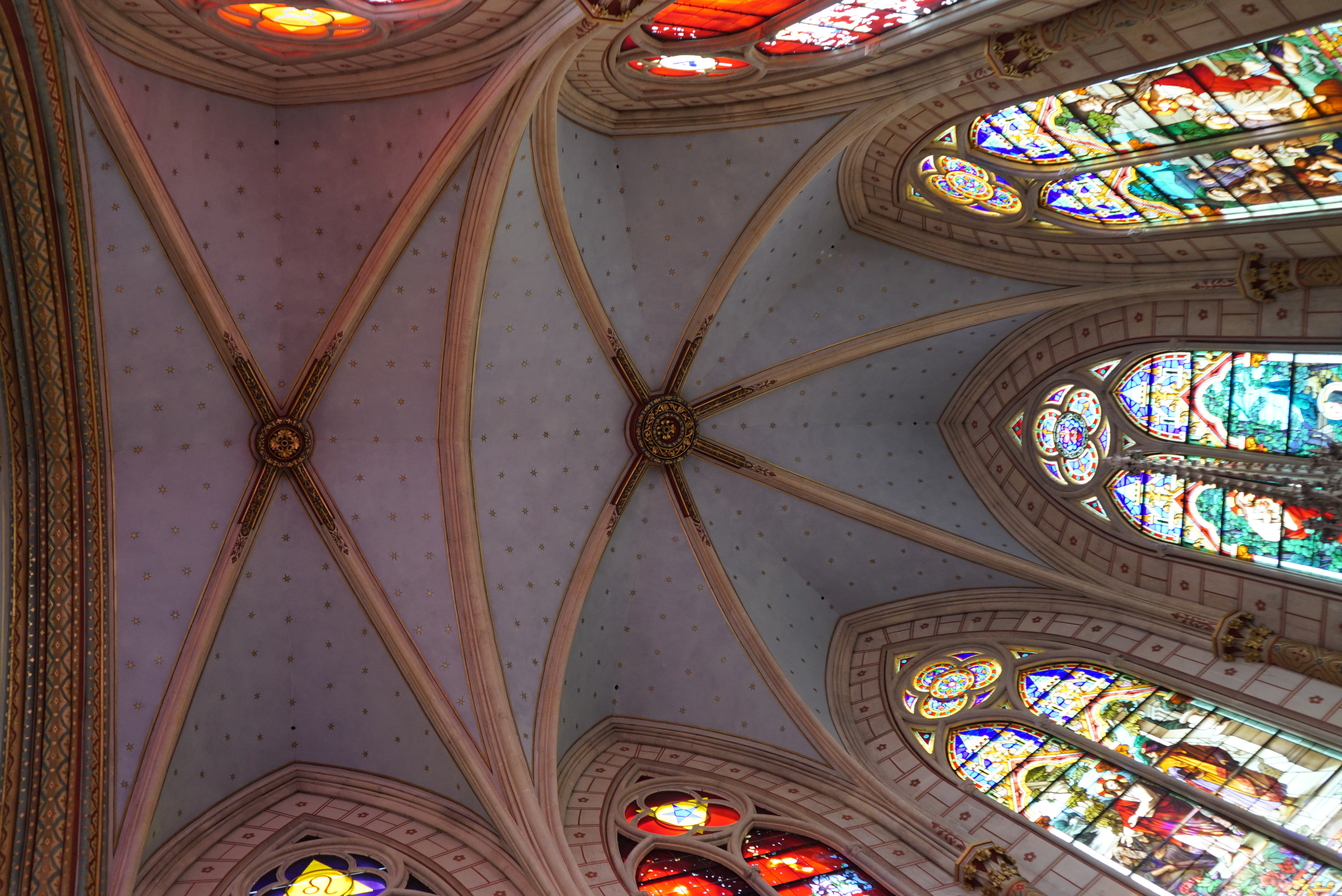 ouvert pendant les journées du patrimoine.